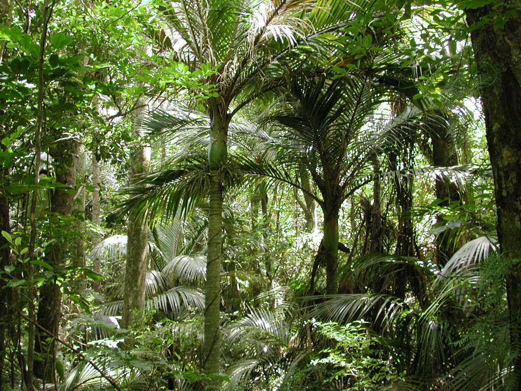 Forest of nikau palms (Rhopalostylis sapida) in Nikau Reserve, Paraparaumu.